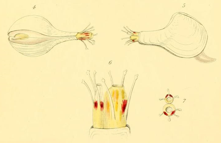 Cuspidaria cuspidata (Olivi, 1792), Cuspidariide, Bivalvia, Mollusca